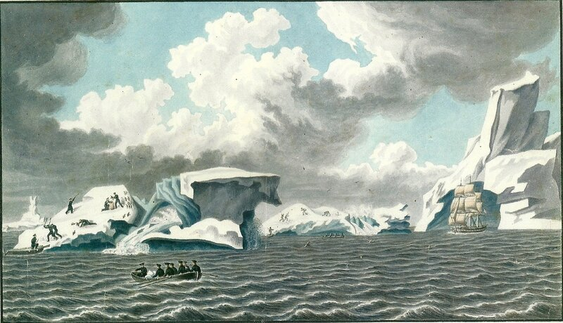 Михайлов Павел Николаевич - Вид ледяных островов